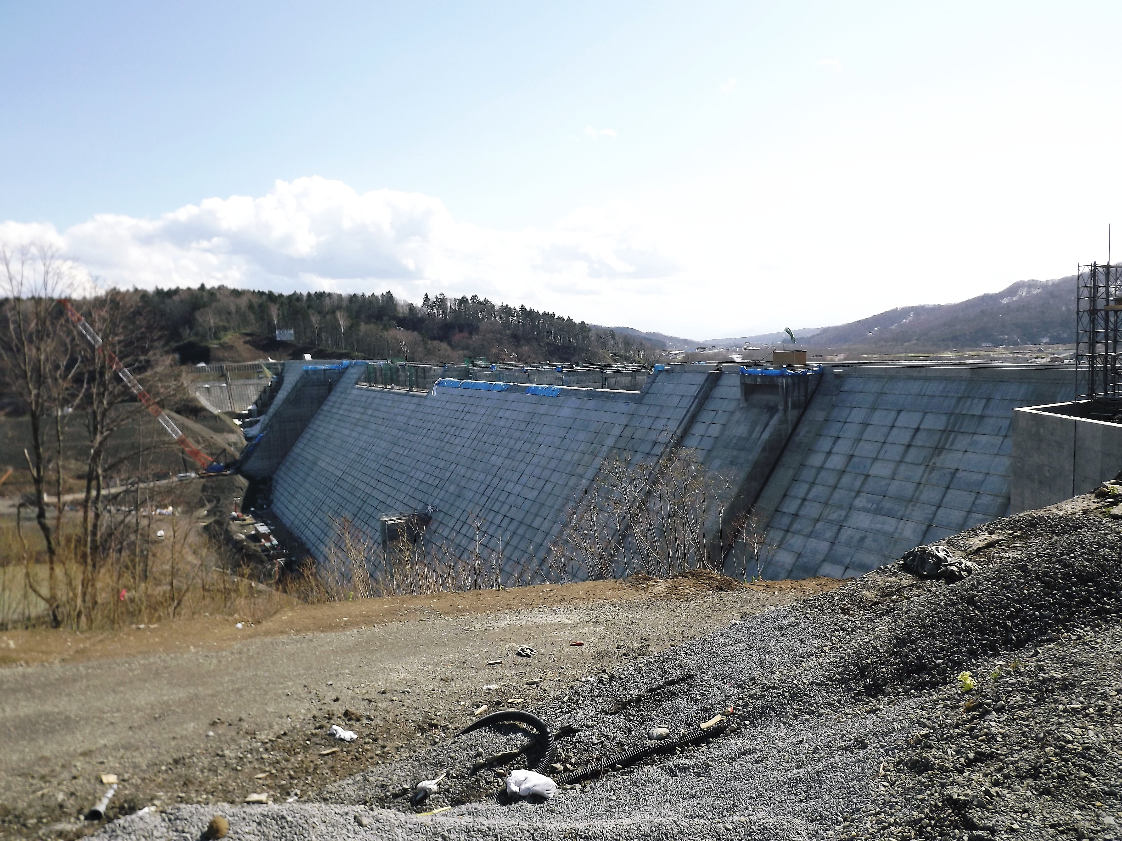 施工中の台形CSGダム（北海道・当別ダム）